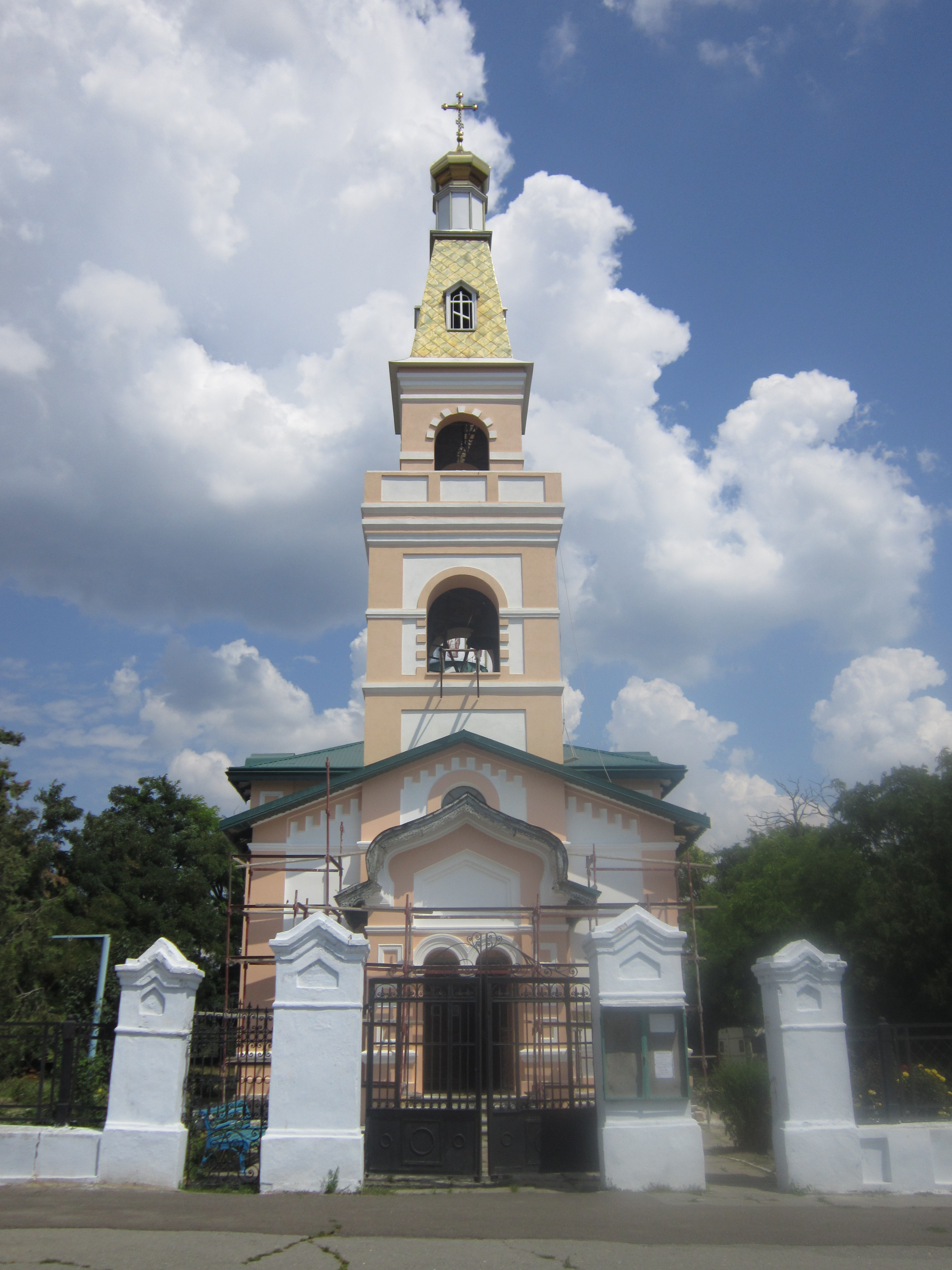 Миколаївська церква (мур.), Очаків, вул.Кірова,1